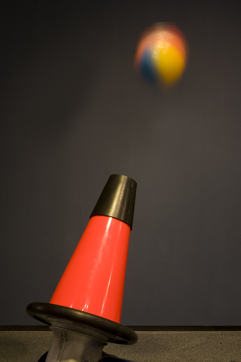 Coloca a pelota sobre o chorro de aire e observa o que ocorre. Mantense en equilibrio? Que pasa se cambias a dirección do chorro? Despois empuxa levemente a pelota en diversas direccións Notas algunha resistencia? A que velocidade calculas que sae o aire pola tobeira? == Coloca la pelota sobre el chorro de aire y observa lo que ocurre. ¿Se mantiene en equilibrio? ¿Qué pasa si cambias la dirección del chorro? Después empuja levemente la pelota en diversas direcciones ¿Notas alguna resistencia? ¿A qué velocidad calculas que sale el aire por la tobera? == Place the ball over the airstream and watch what happens. Does it keep balance? What happens if you change the direction of the stream? Now slowly pull the ball out of the airstream. Do you feel i being pulled back? At Which speed do you consider the air comes out of the nozzle?